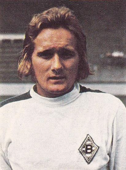 Allan Simonsen (1976), 'Euro Football 1976 - 1977', Panini figurina n°34.